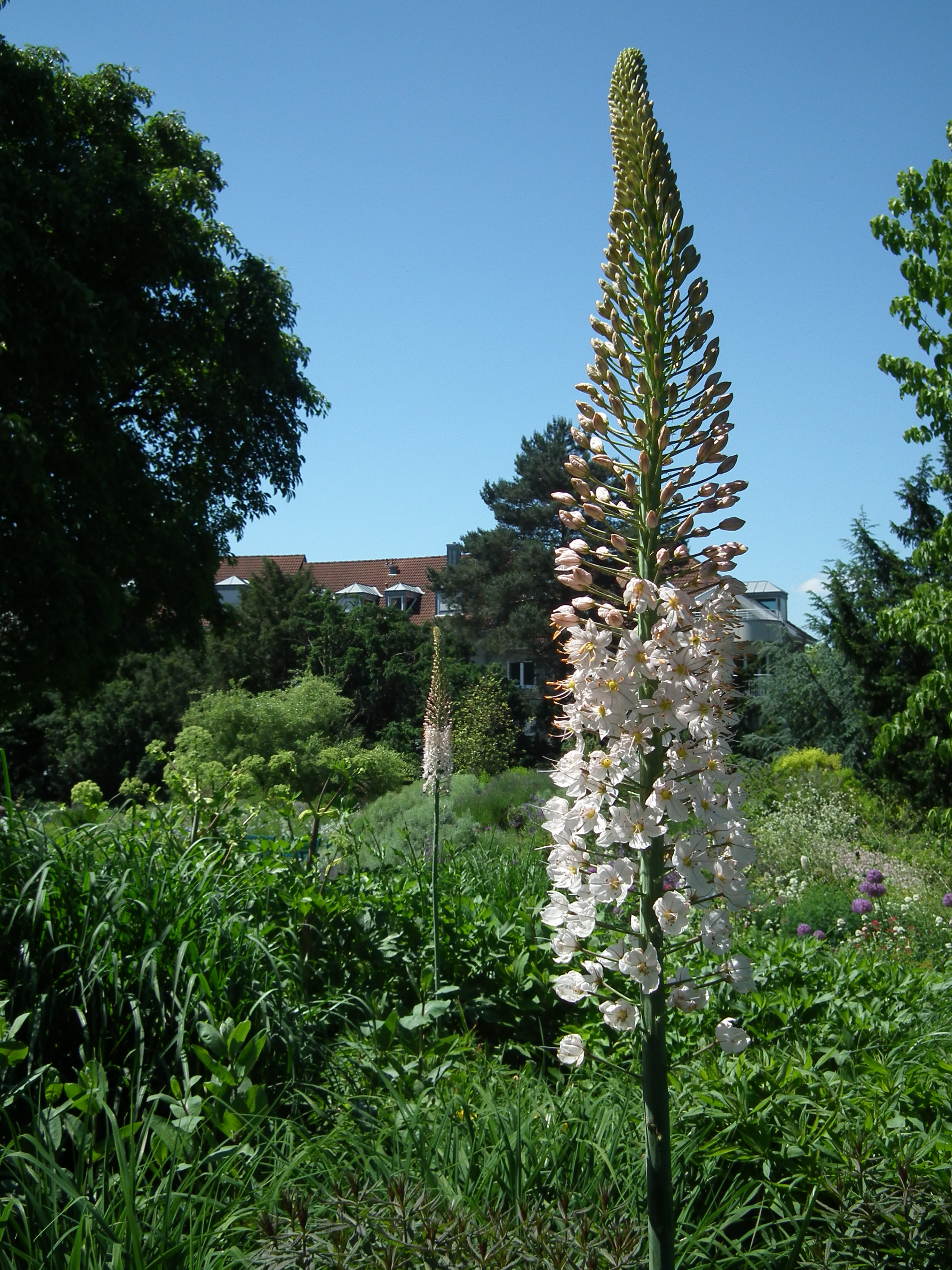 Riesen-Steppenkerze (Eremurus robustus), fotografiert im Schau- und Sichtungsgarten Hermannshof in Weinheim (Baden-Württemberg, Deutschland)